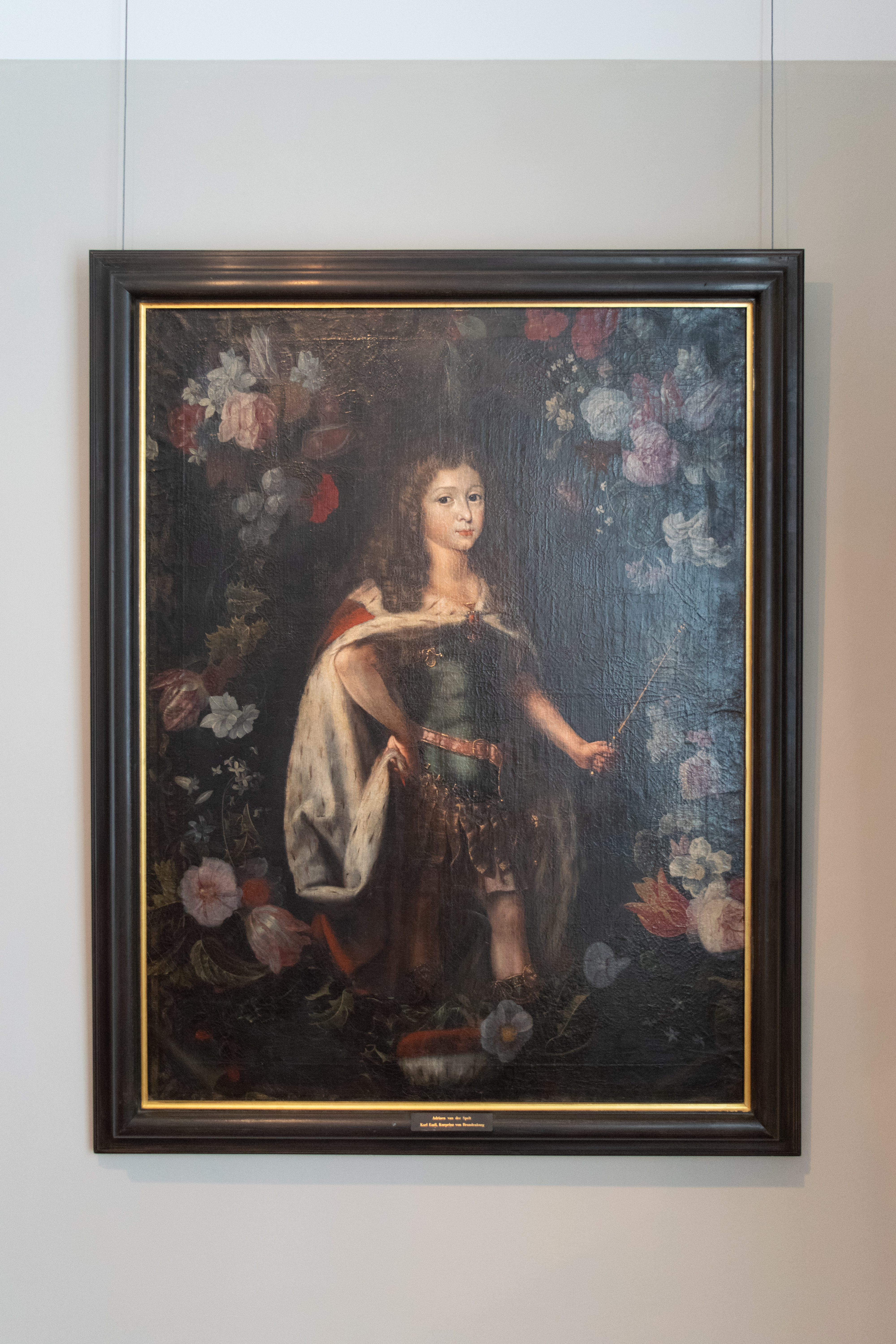 Glam on Tour Jagdschloss Grunewald, Berlin